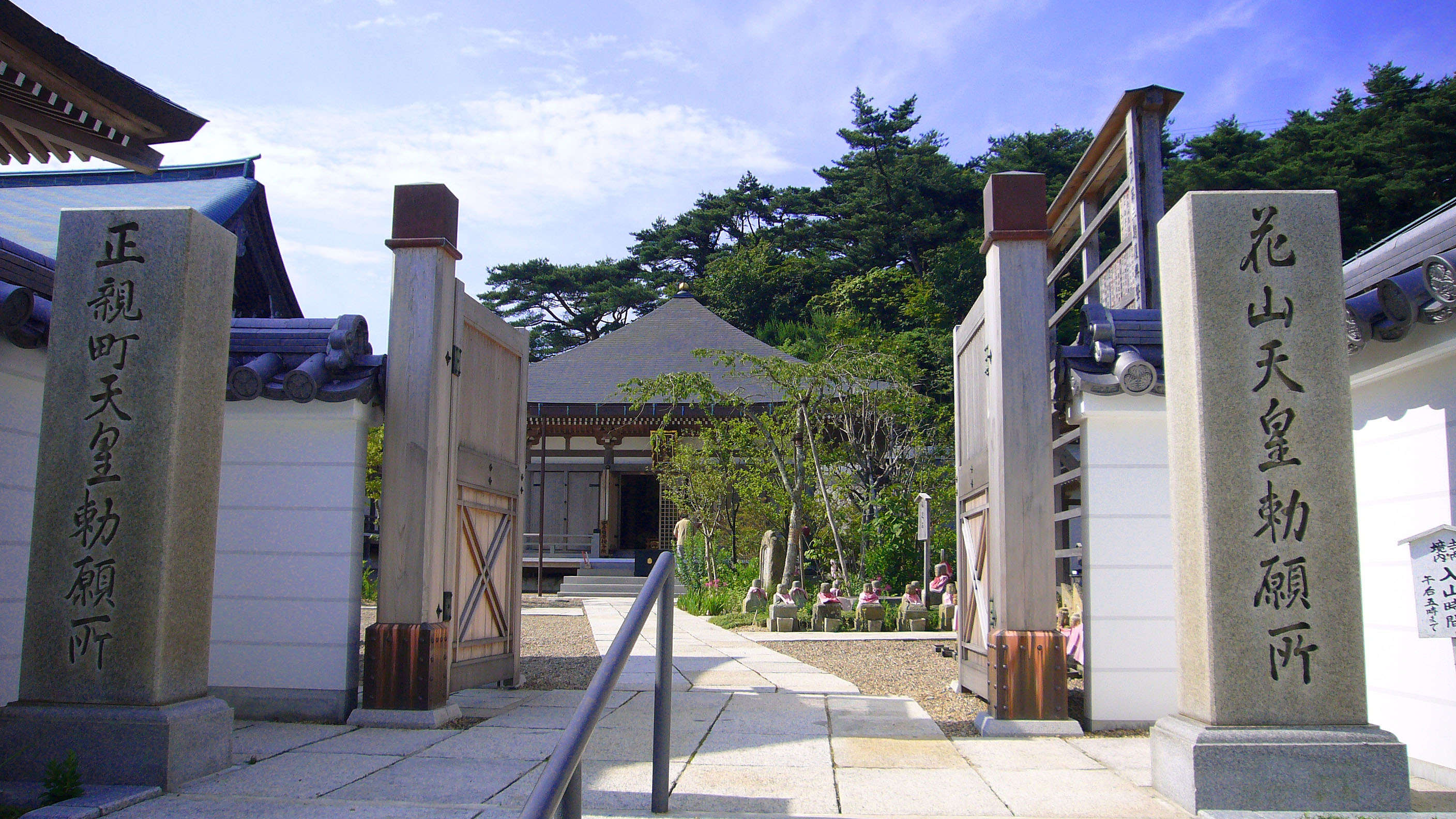 Tori-Tenjyo-ji in Kobe, Japan